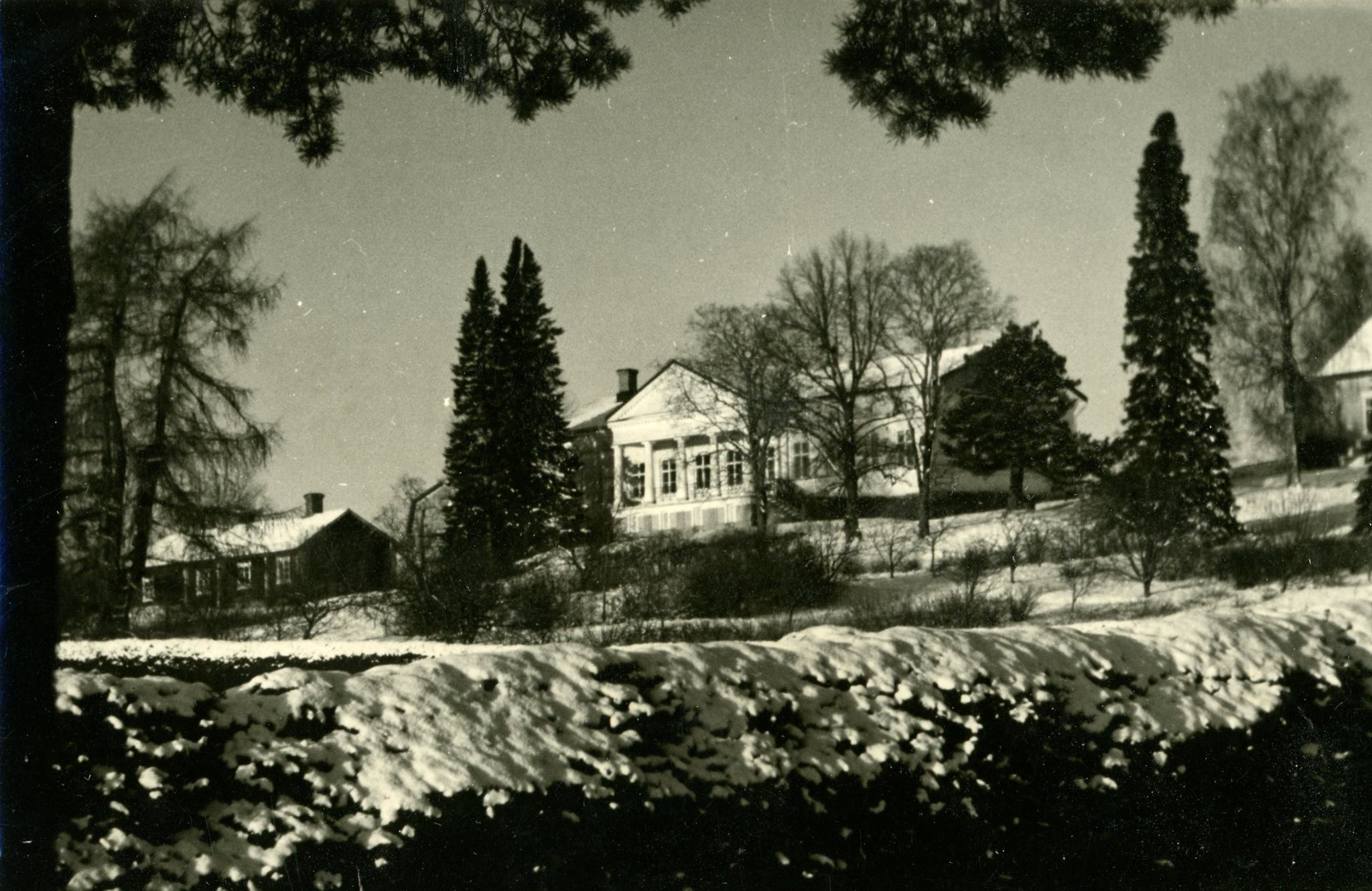 tammenpään kartano